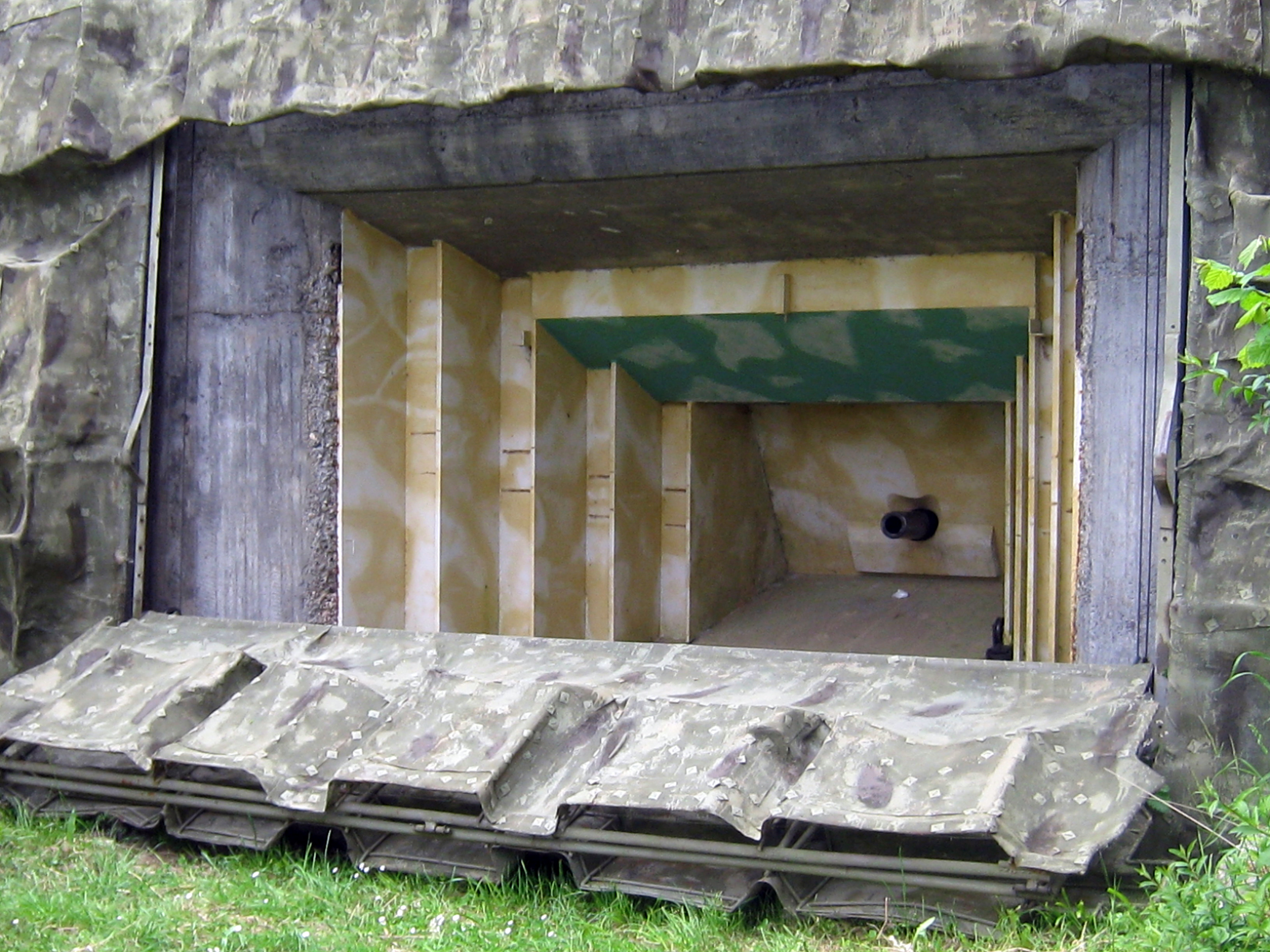 Aussenansicht Geschütz 2 im Festungsmuseum Reuenthal